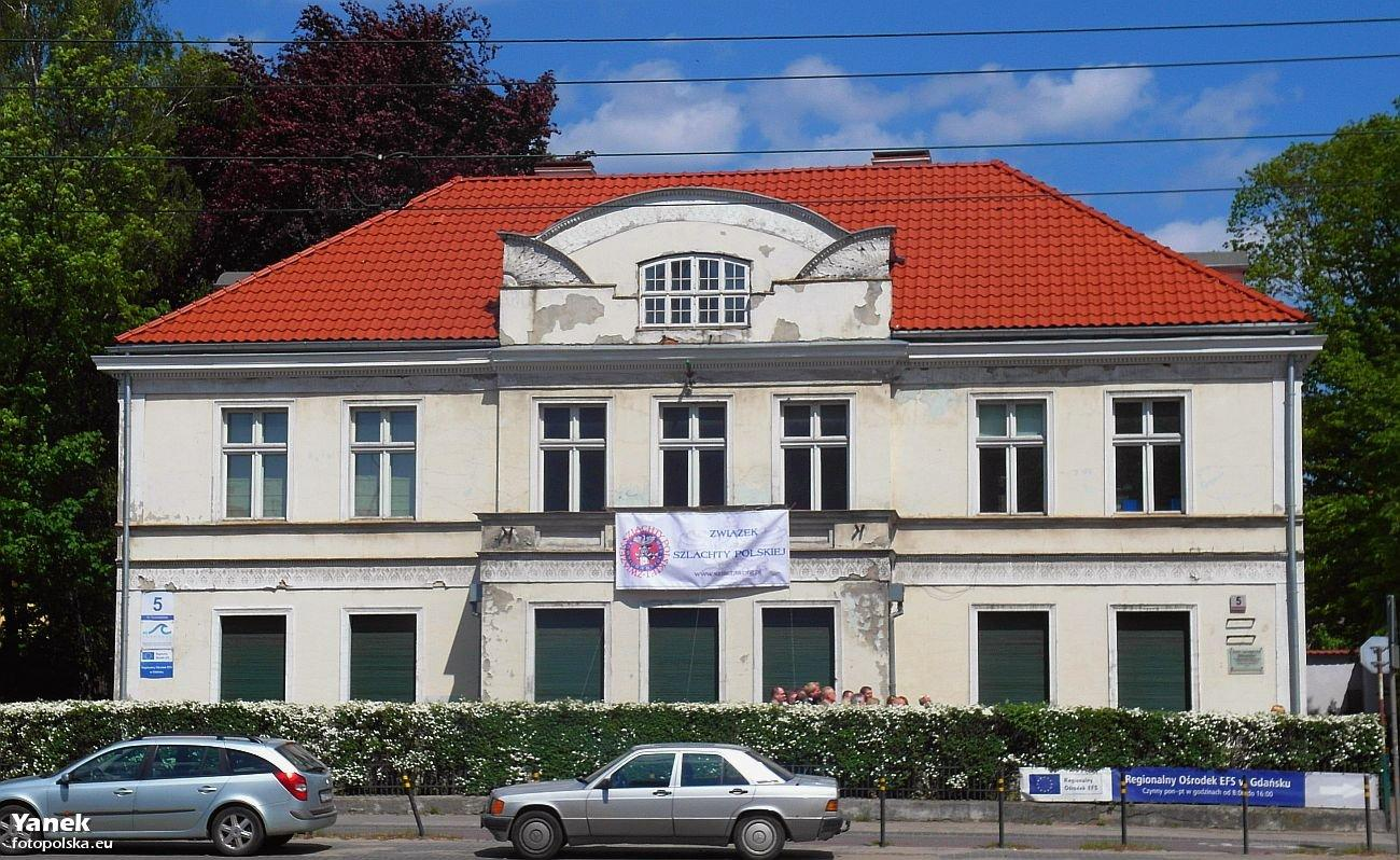 Dawna rezydencja zasłużonego gdańskiego rodu Uphagenów. Przez ostatnich kilkadziesiąt lat, obiekt służył gdańskiemu Urzędowi Stanu Cywilnego jako miejśce ślubów cywilnych. Od niedługiego czasu rezyduje tu jedna z agend funduszy UE.